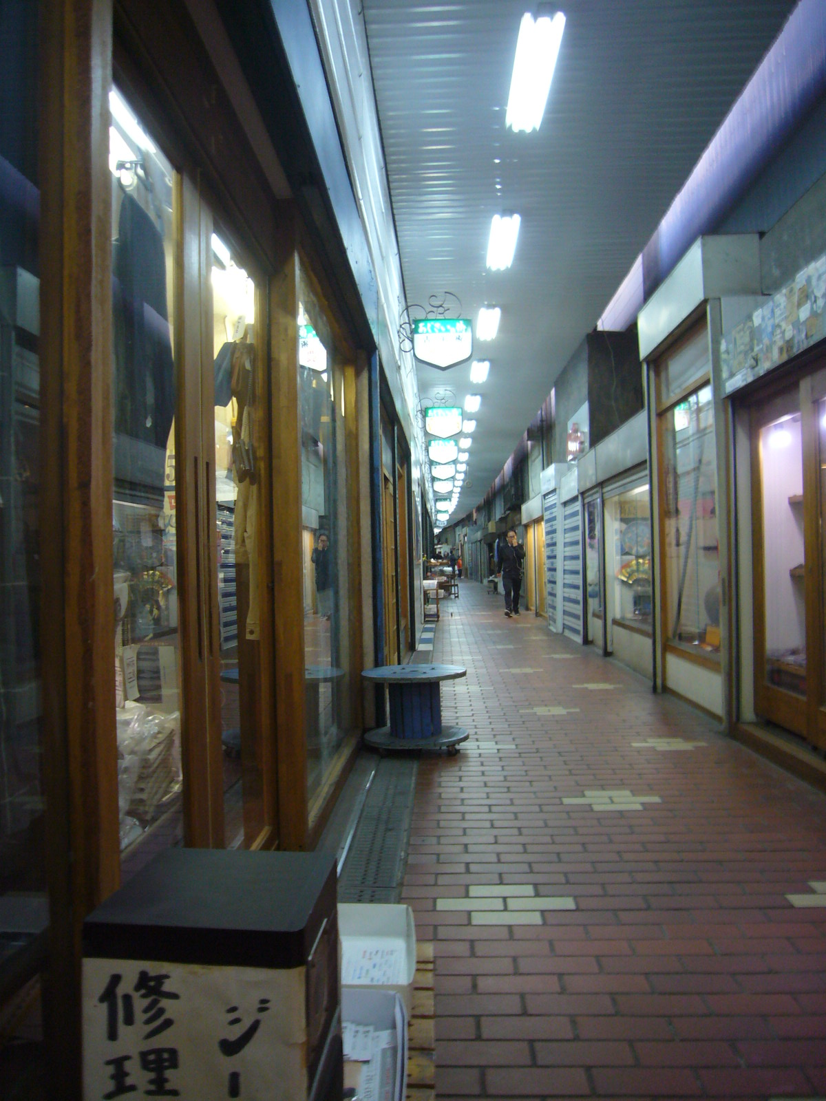 モトコー6番街の中です。2017年4月撮影。 Panasonic Lumix DMC-FX01